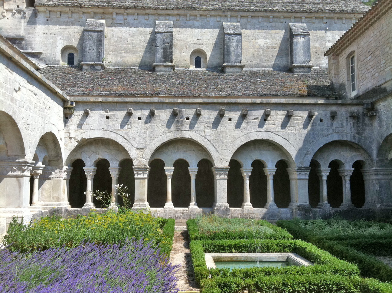 Abbaye de Senanque, Gordes, France